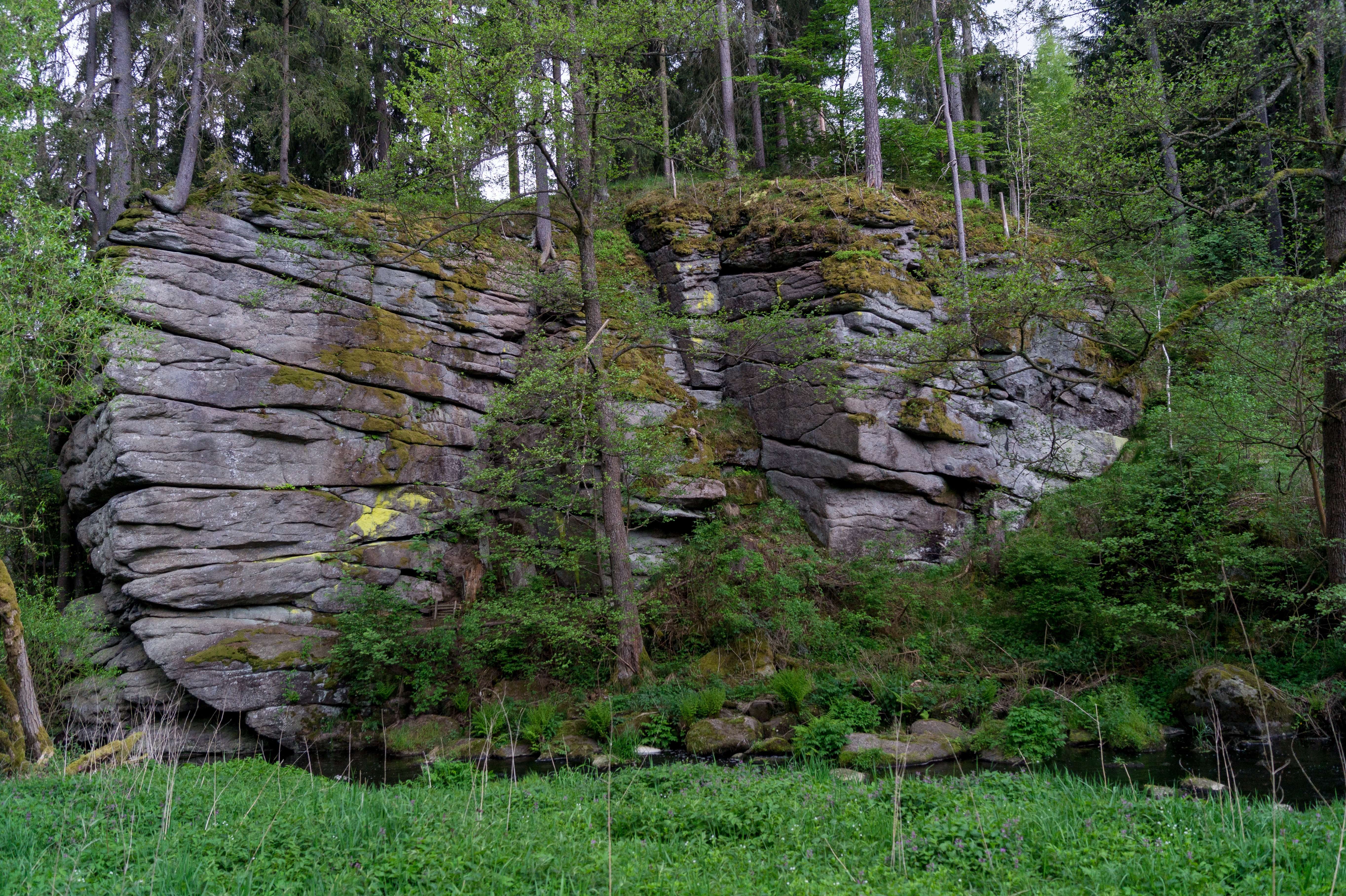 Der Granitfelsen (Selber Granit) weist eine deutliche Lager- und Querklüftung auf, im Ansatz ist auch Wollsackverwitterung zu erkennen.